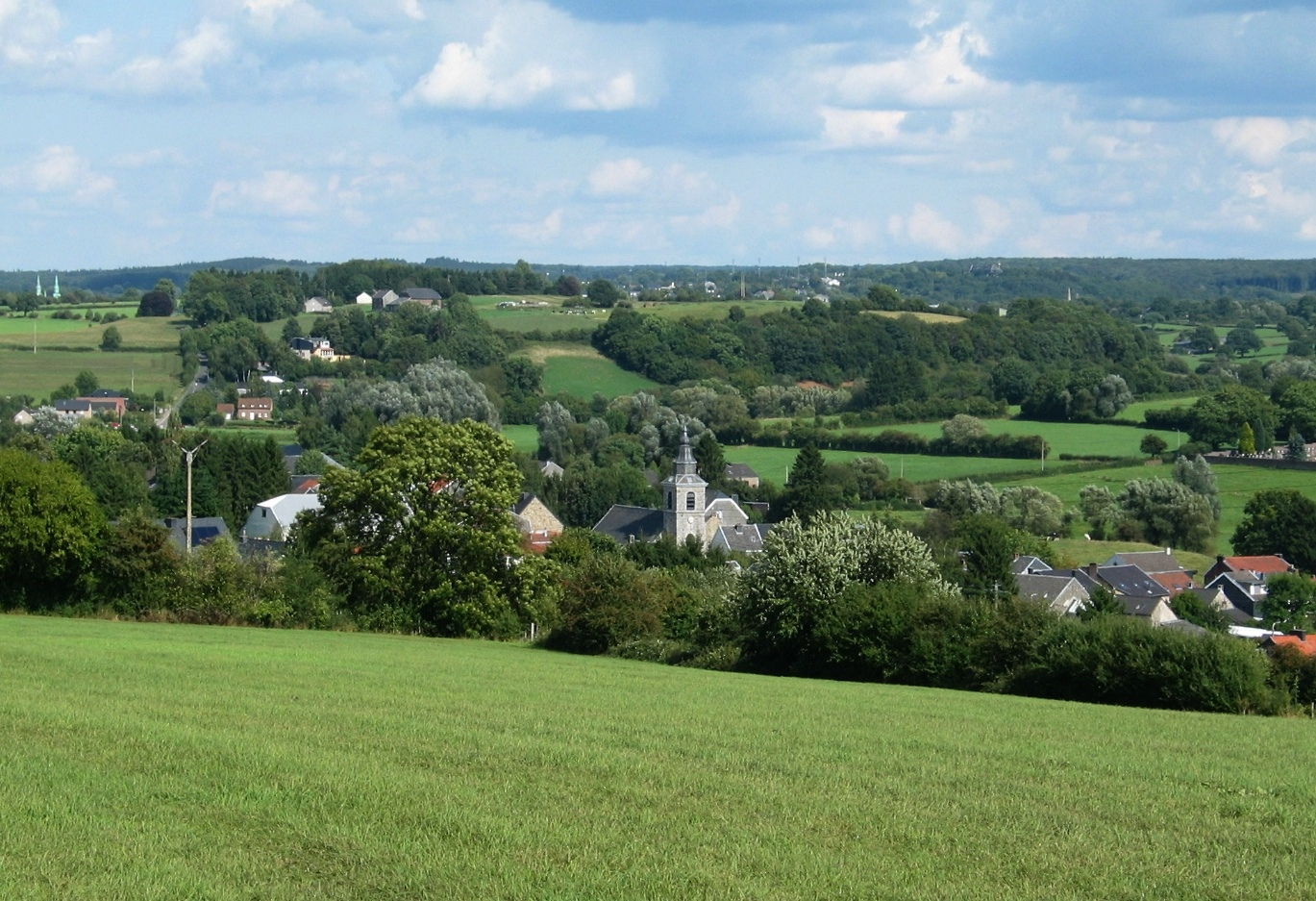 Membach, Belgien Süd-West Ansicht